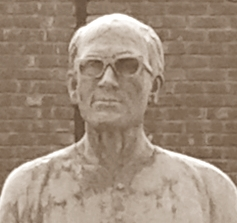 ক্যাপ্টেন মনসুর আলী